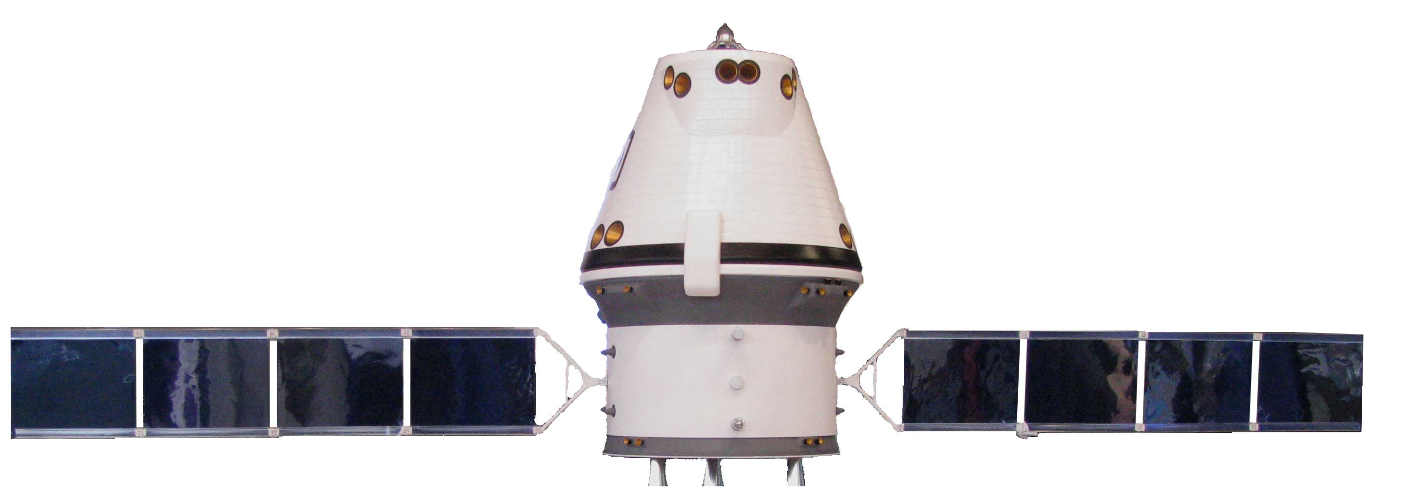 Макет ПТК НП на стенде РКК "Энергия" на выставке МАКС 2009